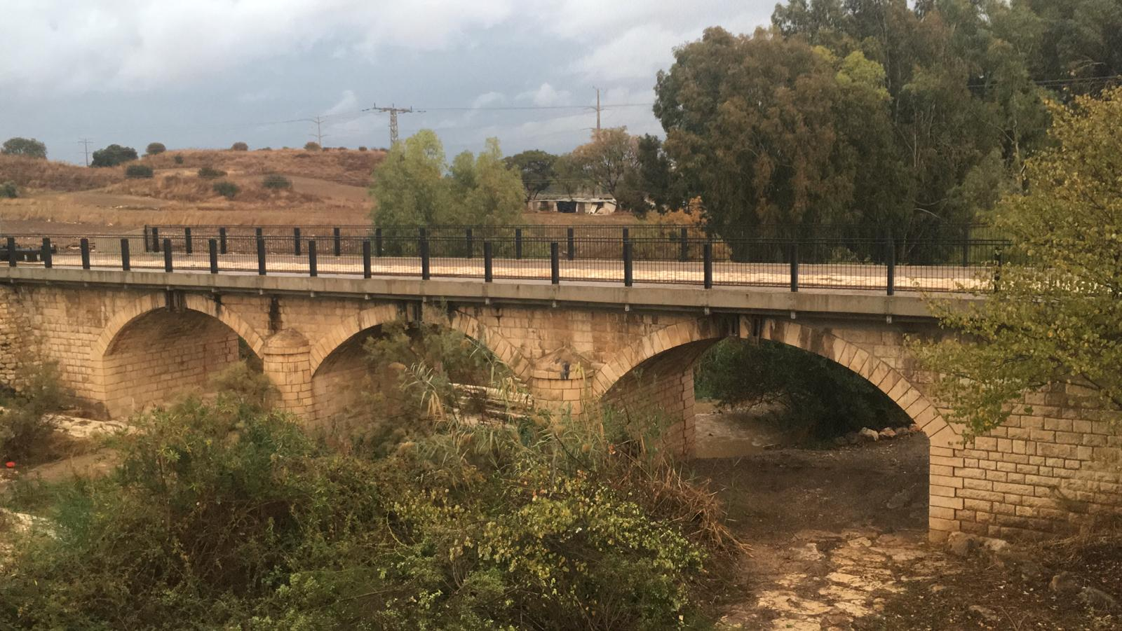 הגשר בעל שלוש הקשתות שנבנה על הקישון למעבר כלי רכב